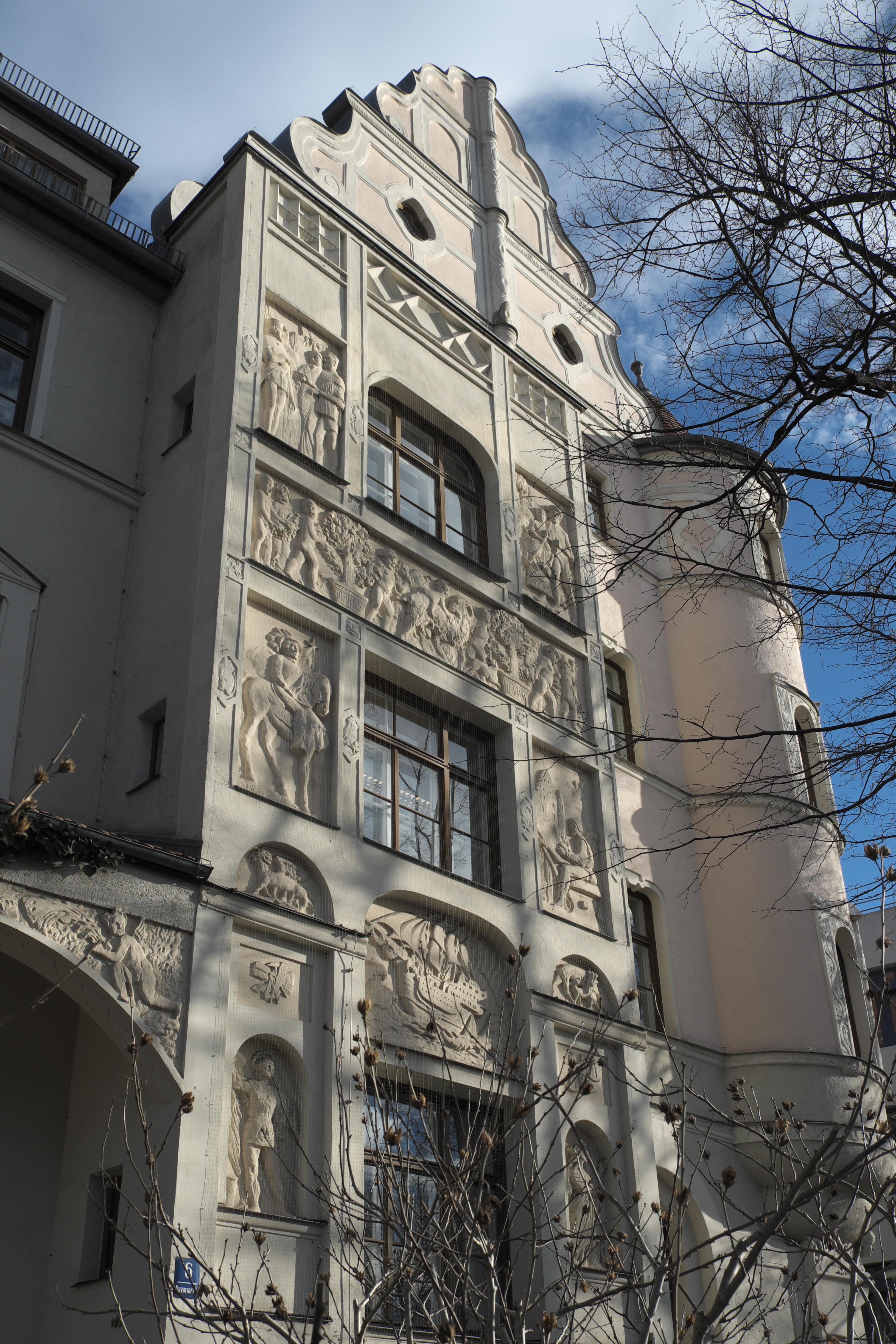 Mietshaus am Bavariaring 6 in der Ludwigsvorstadt im Stadtbezirk Ludwigsvorstadt-Isarvorstadt in München (Bayern/Deutschland), 1901/02 von August Zeh erbaut